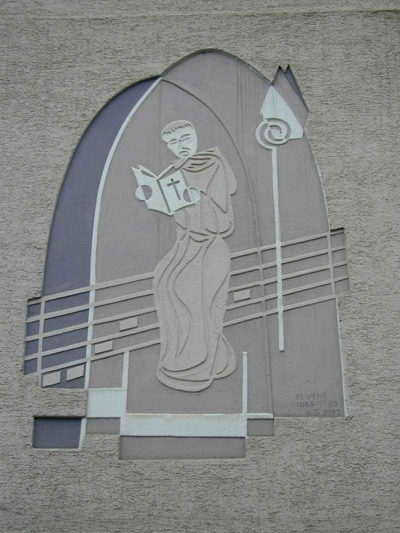 Michael Vehe - als Kratzmalereitechnik am katholischen Pfarrhaus in der Weirachstraße in Heilbronn-Biberach